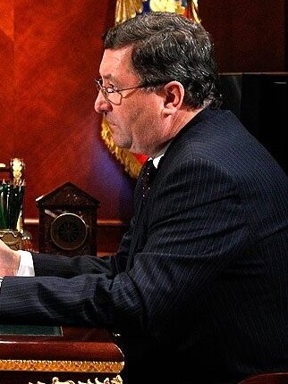 Олег Бетин